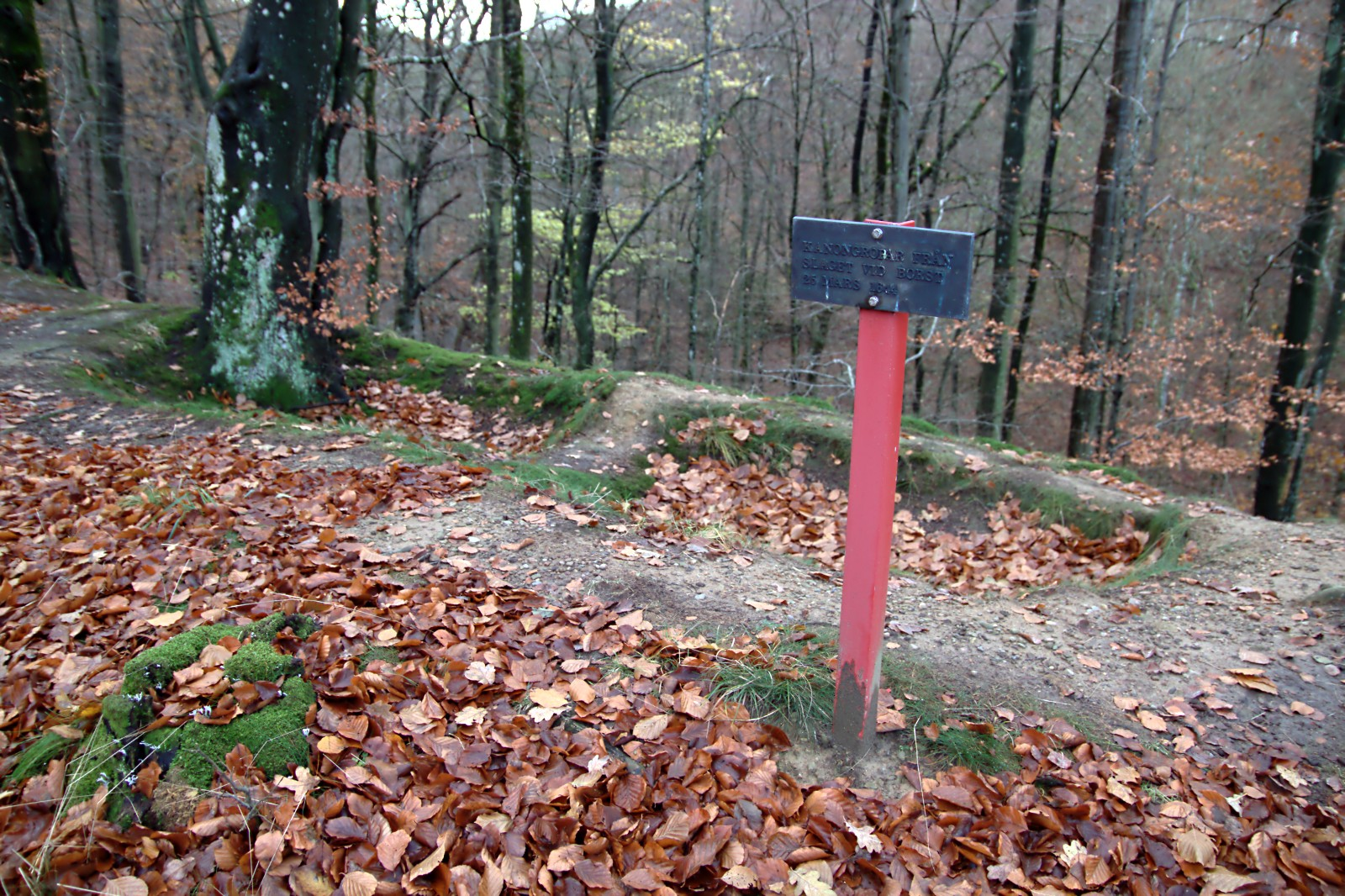 Bild på de kanongropar som finns på norra delen av naturreservatet Borstbäcken.